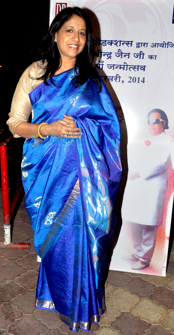 Kavita Krishnamurthy at launch of Ravindra Jain’s book ‘Dil Ki Nazar Se’